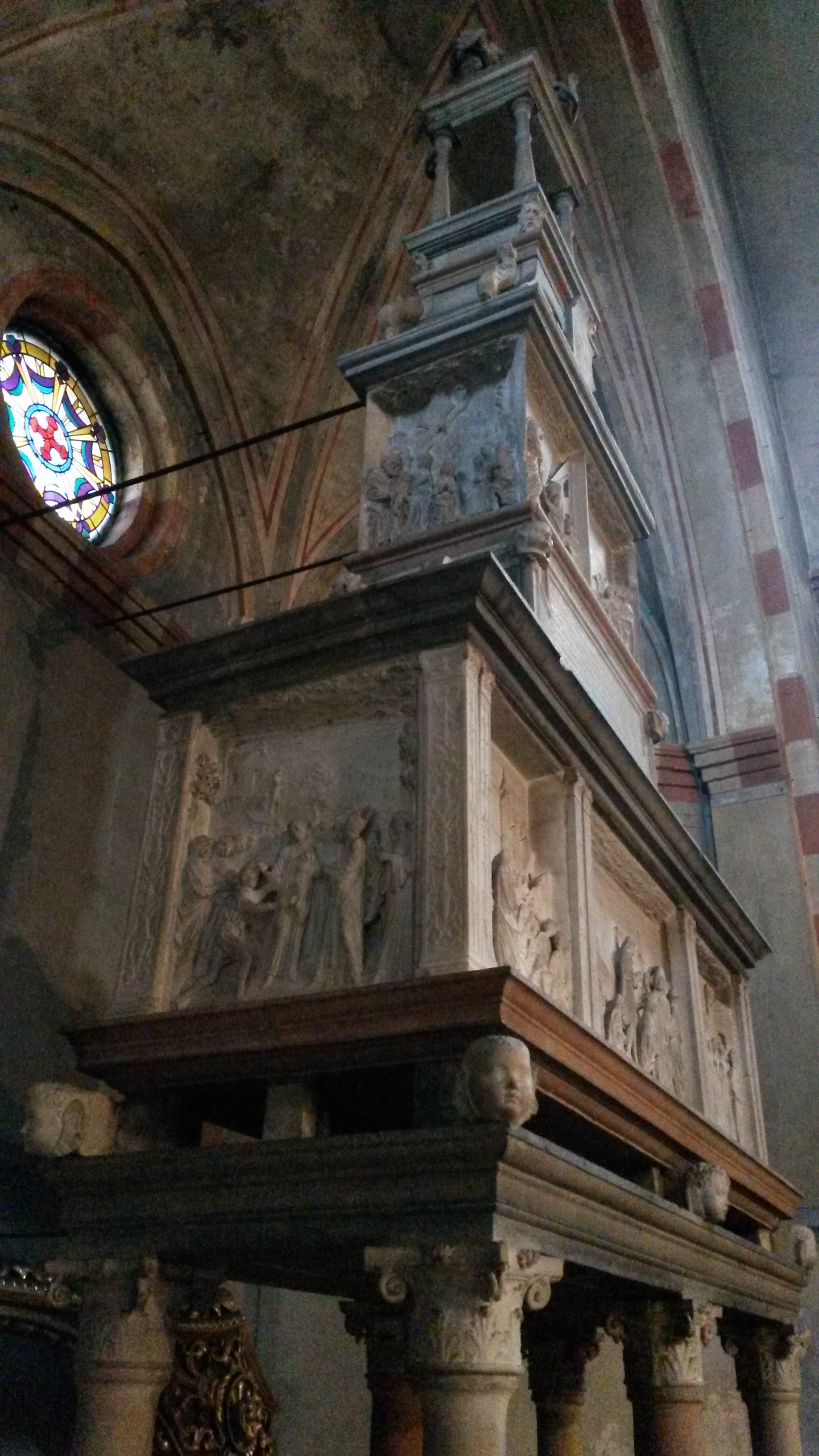 Monastero romanico di San Lanfranco (Pavia), arca rinascimentale di San Lanfranco, dello scultore lombardo Giovanni Antonio Amadeo